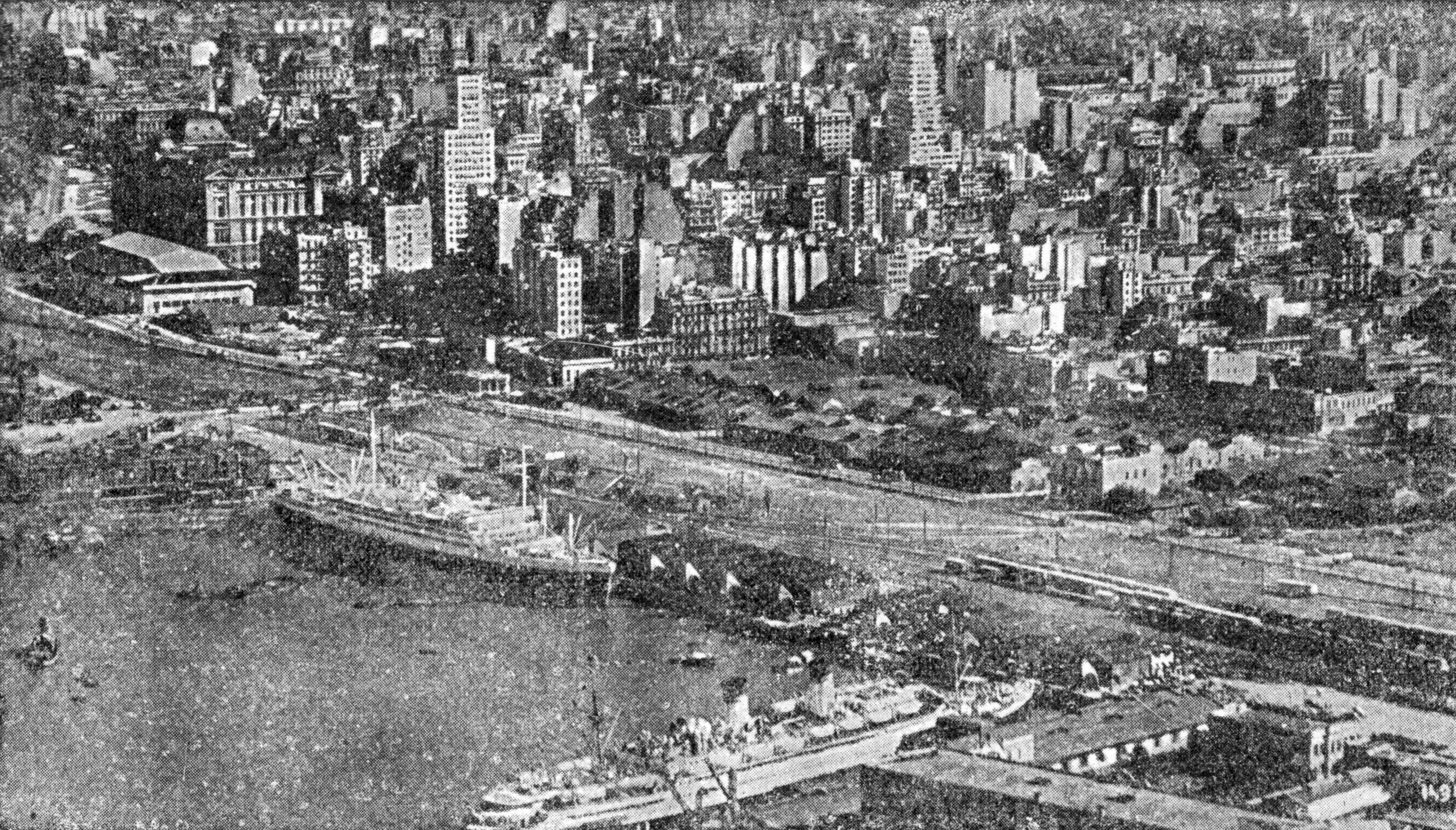 Vista de la ciudad de Buenos Aires y la Dársena Norte, a fines de la década de 1940.